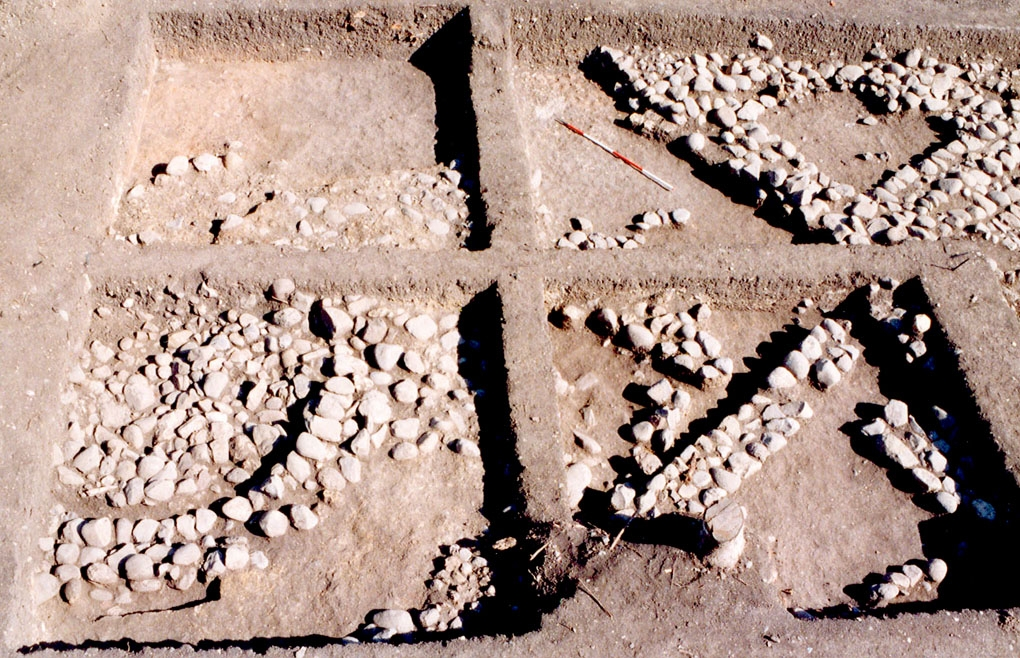 שכבה - אתר ארכאולוגי הגושרים IV